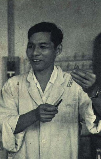 1962-02 1962年 林传光教授